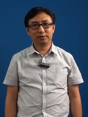 中文（香港）: 狄志遠